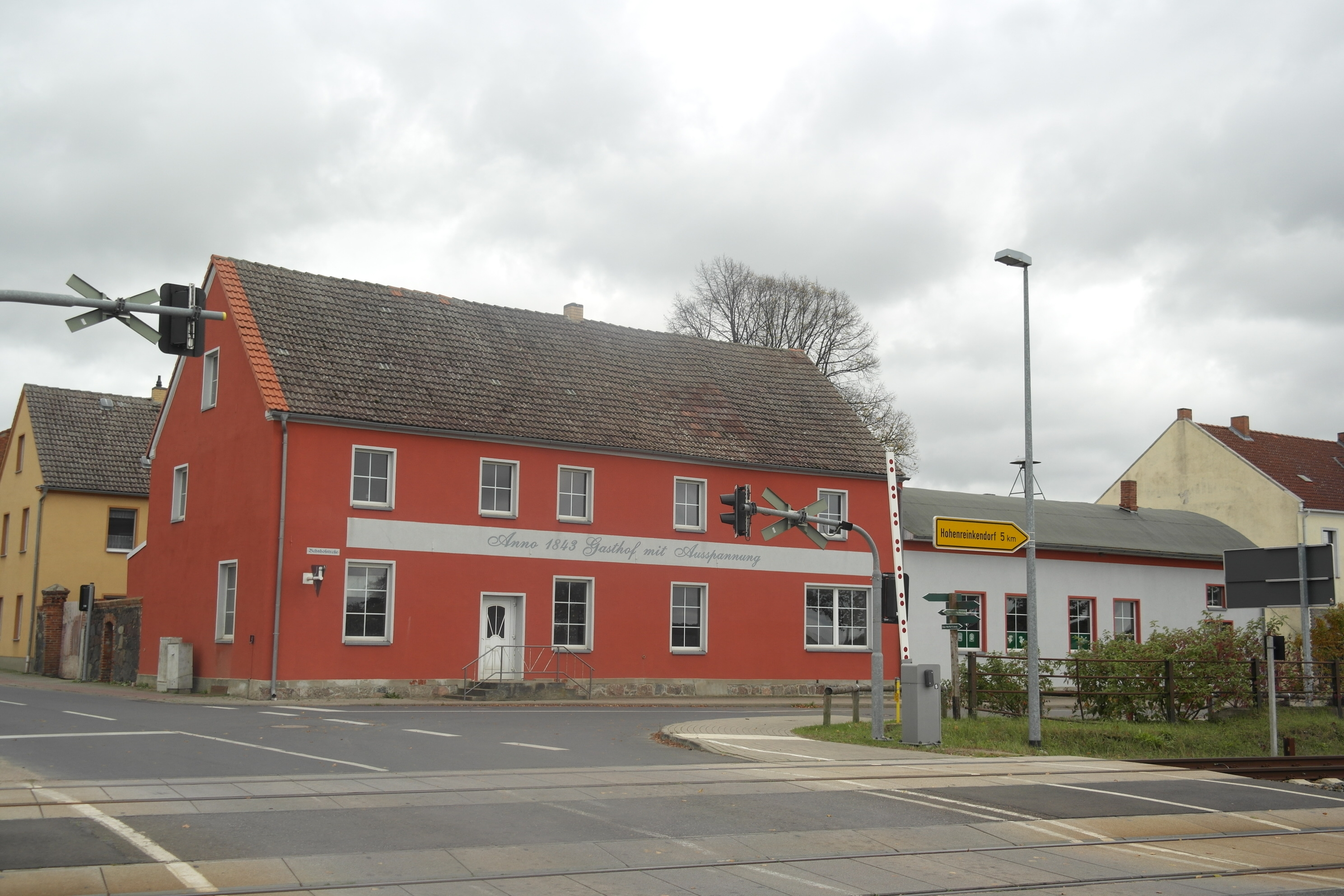 Bahnhof Tantow, ehemaliger Gasthof am Bahnübergang, der mit Streckeneröffnung im Jahr 1843 eröffnet wurde.